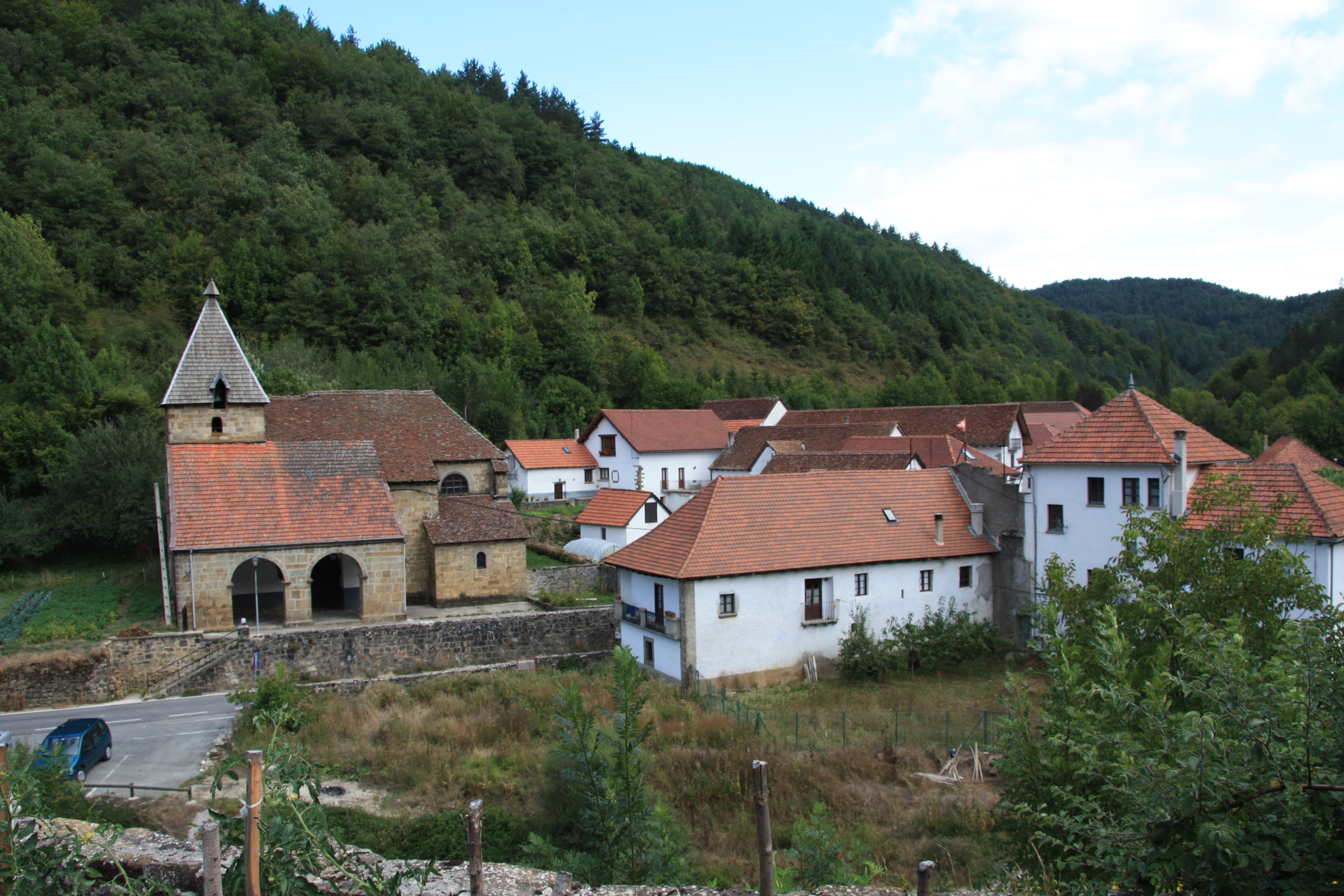 Itzaltzuko ikuspegia.